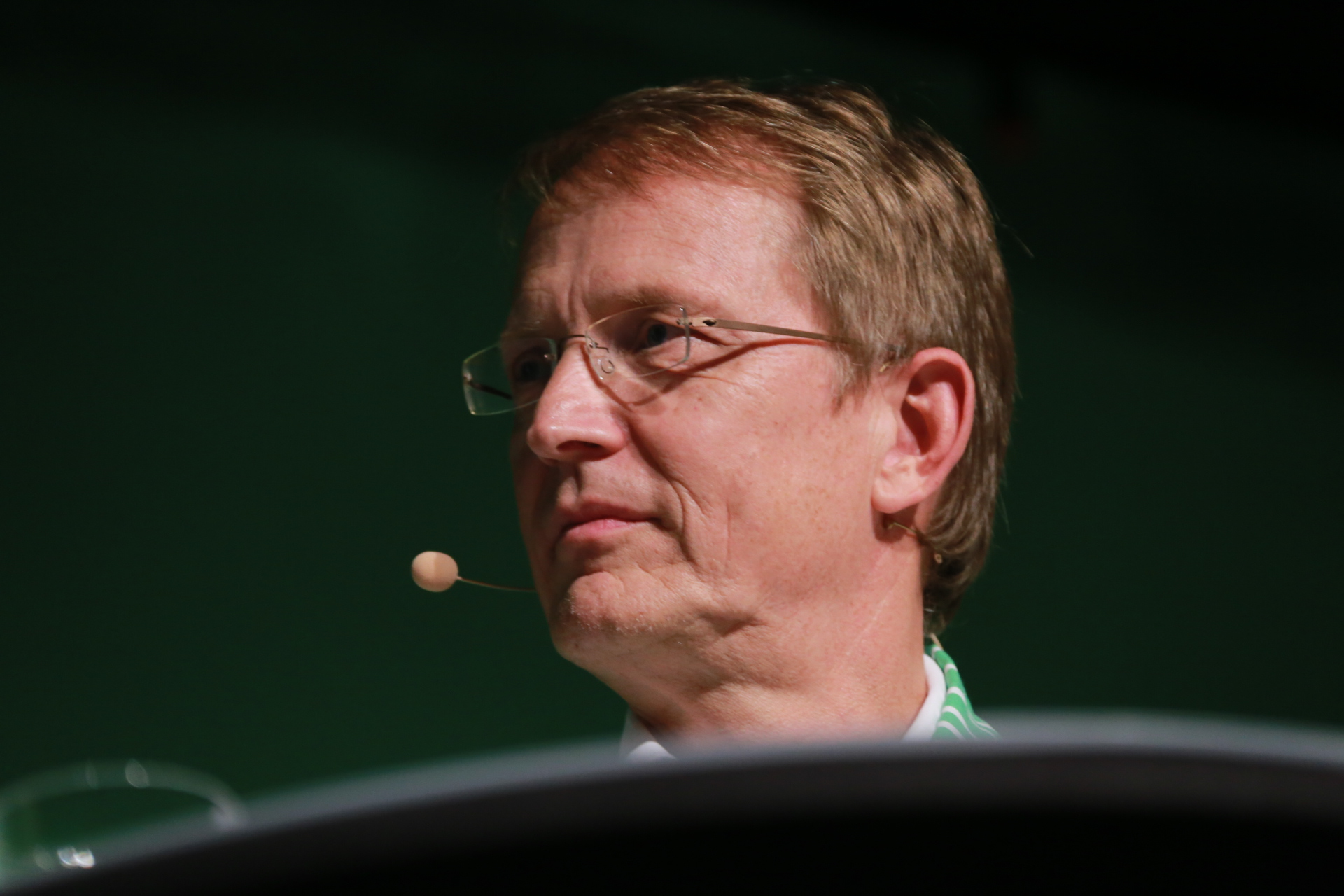 Stephan-Andreas Casdorff auf dem 100. Deutschen Katholikentag